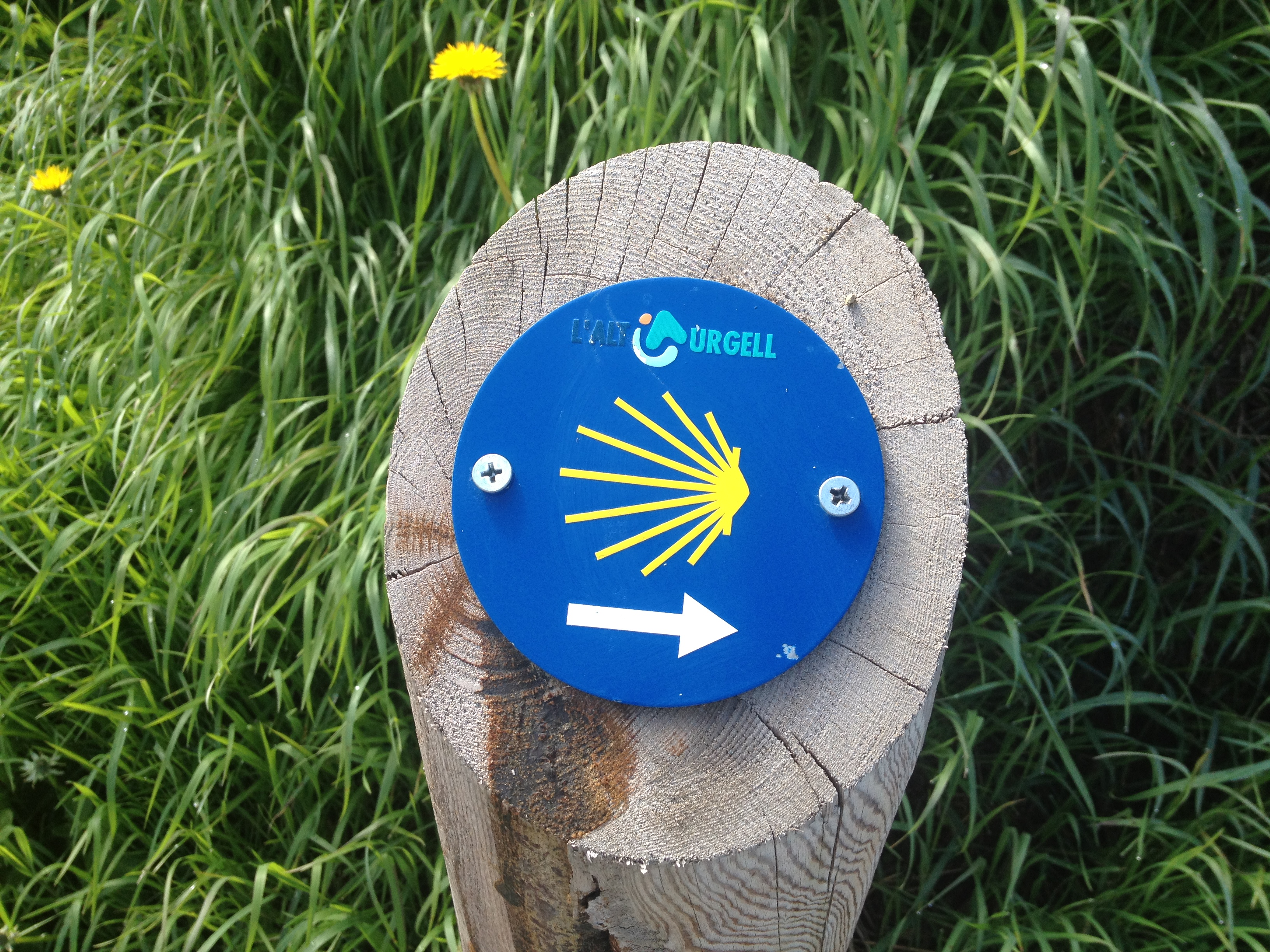 Pal indicatiu del Camí de Sant Jaume al Pla de Sant Tirs, Ribera d'Urgellet